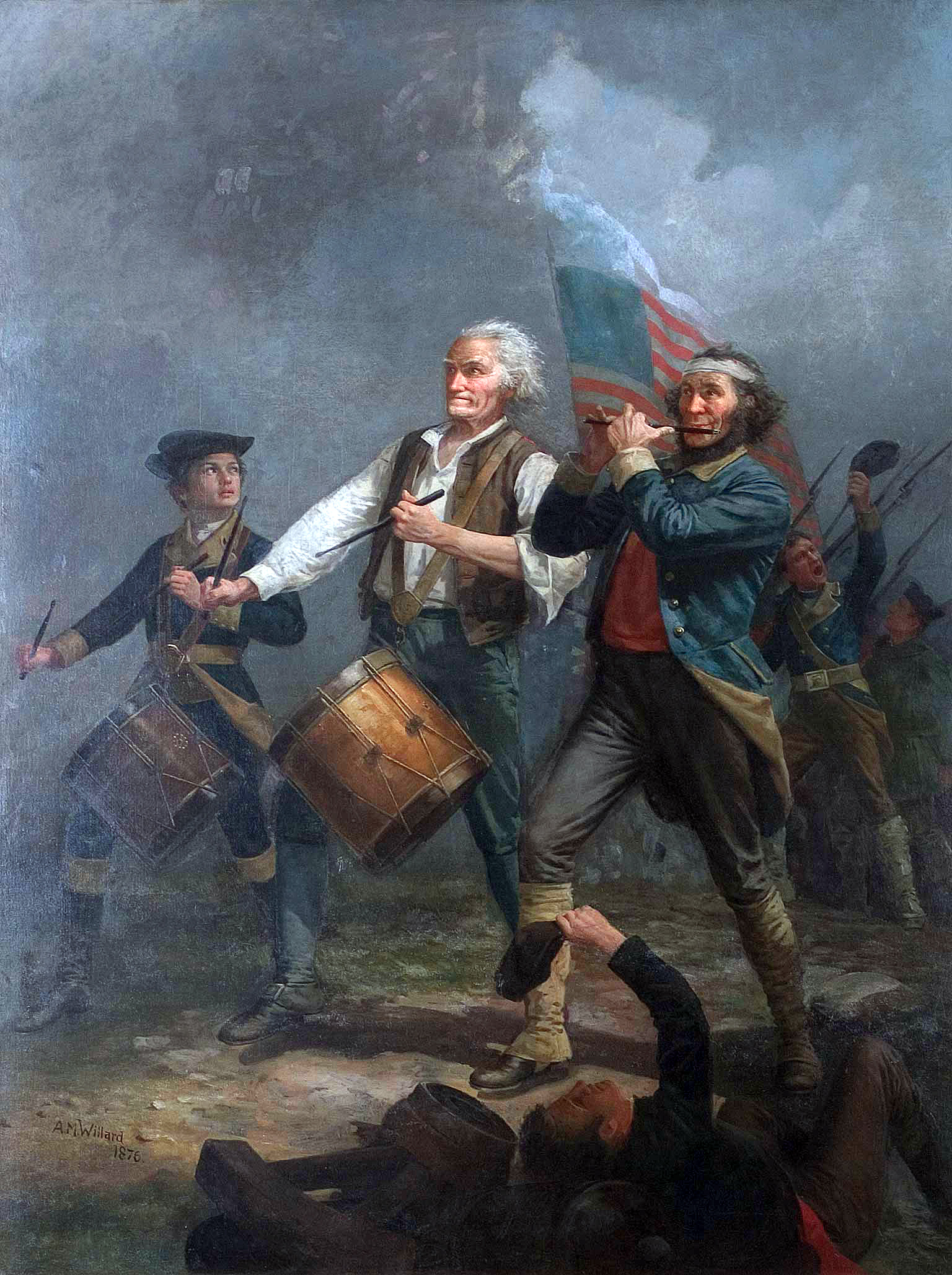 Deux tambours et un fifre défilent devant le drapeau des États-Unis